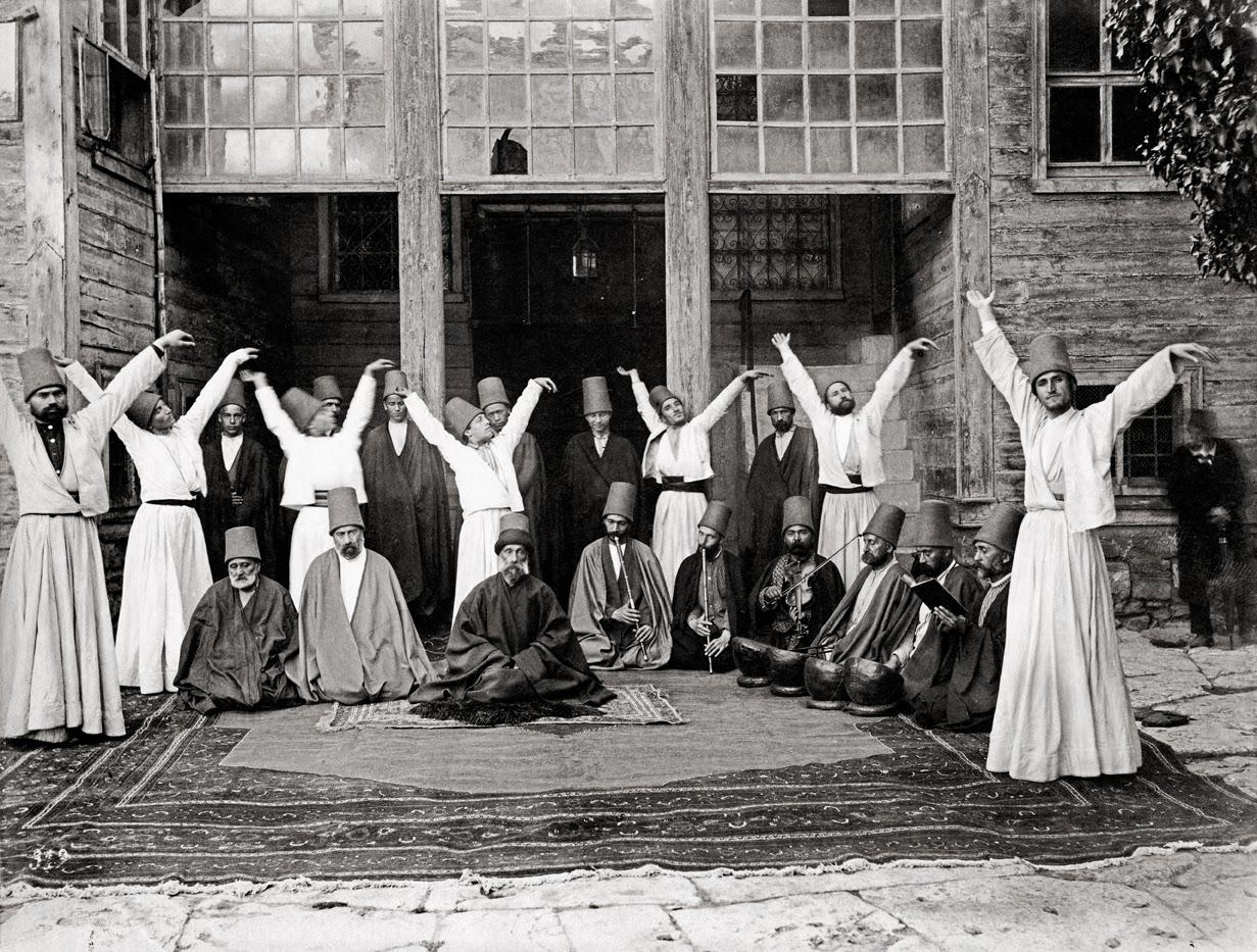 Galata Mevlevihanesi'ndeki Mevleviler, 1870.